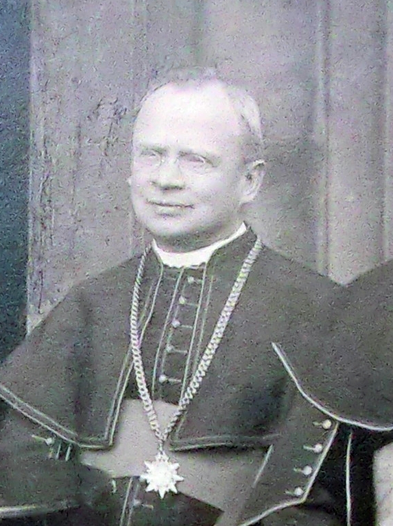 Kanovní Raimund Fuchs při setkání kapituly s litoměřickým biskupem Emanuelem Schöblem (cca 1904)